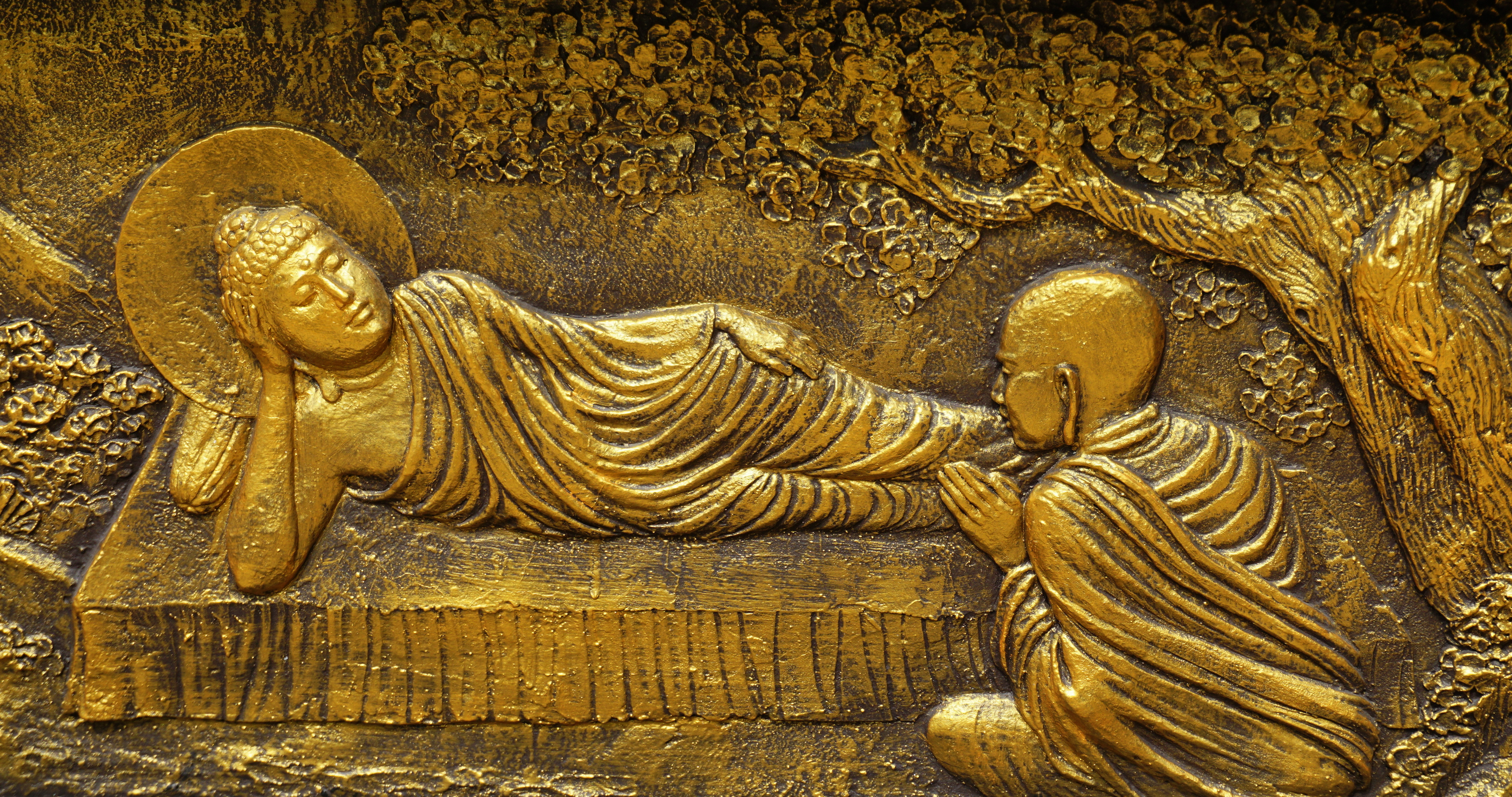 Maha Vihara Mojopahit, Trowulan, East Java